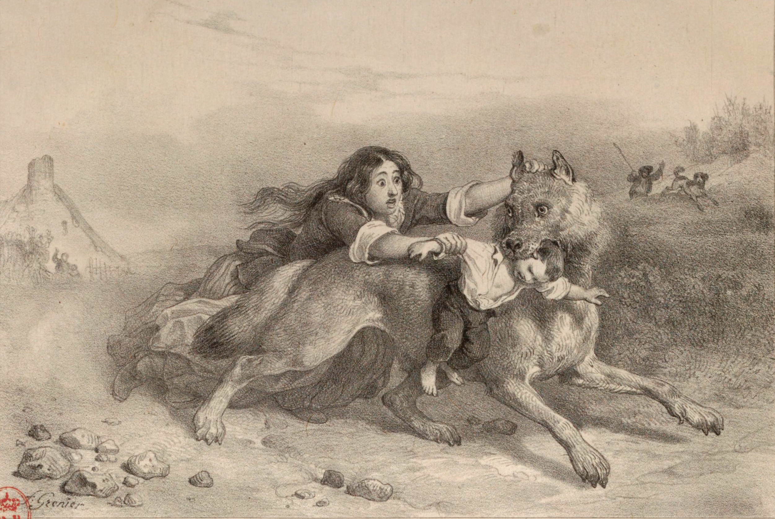 Le combat de Jeanne Jouve pour sauver ses enfants de la Bête du Gévaudan. Gravure publiée dans le Journal des chasseurs, octobre 1839 - septembre 1840.